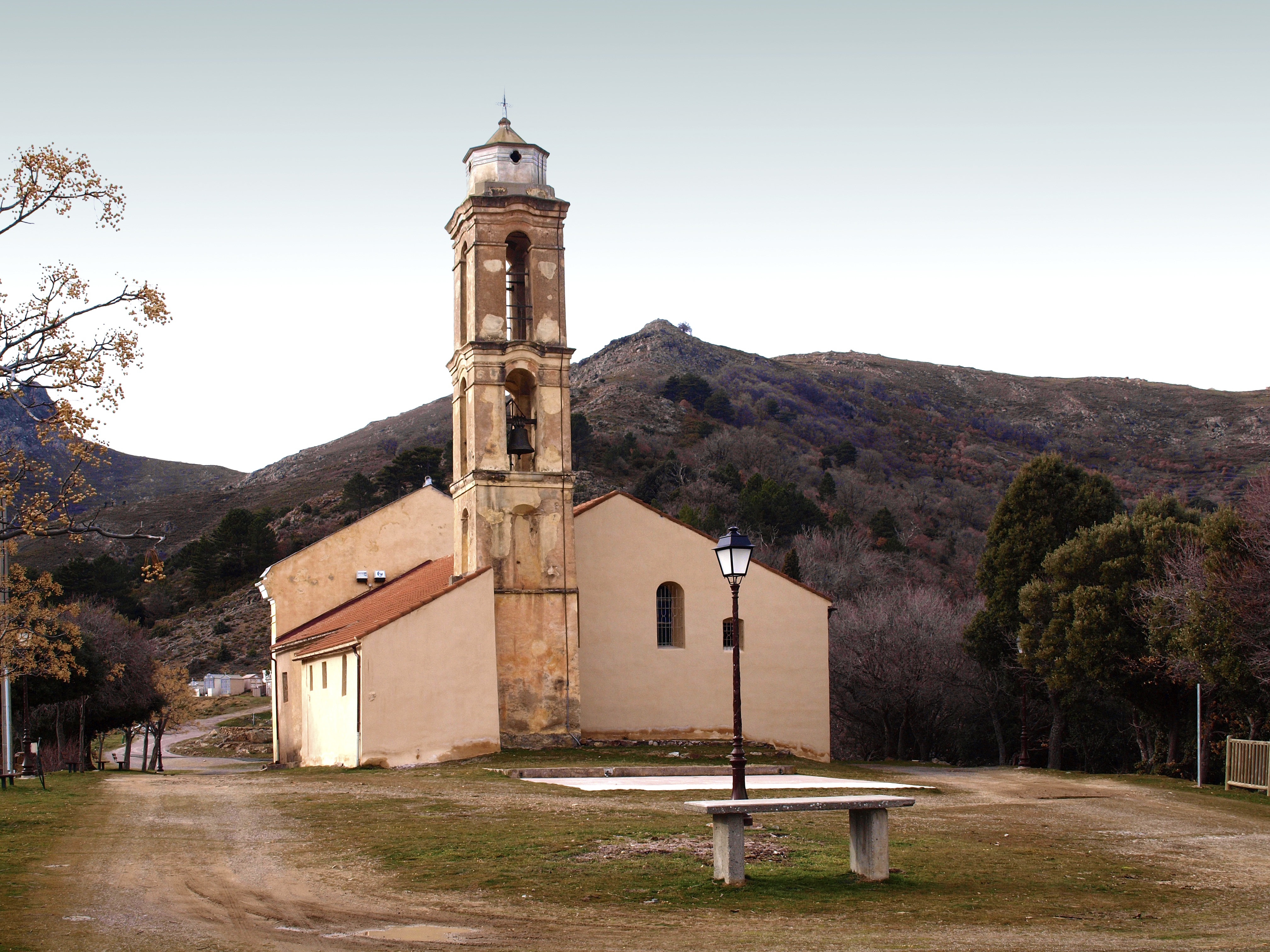 Pioggiola (Corsica) - Église Santa-Maria Assunta